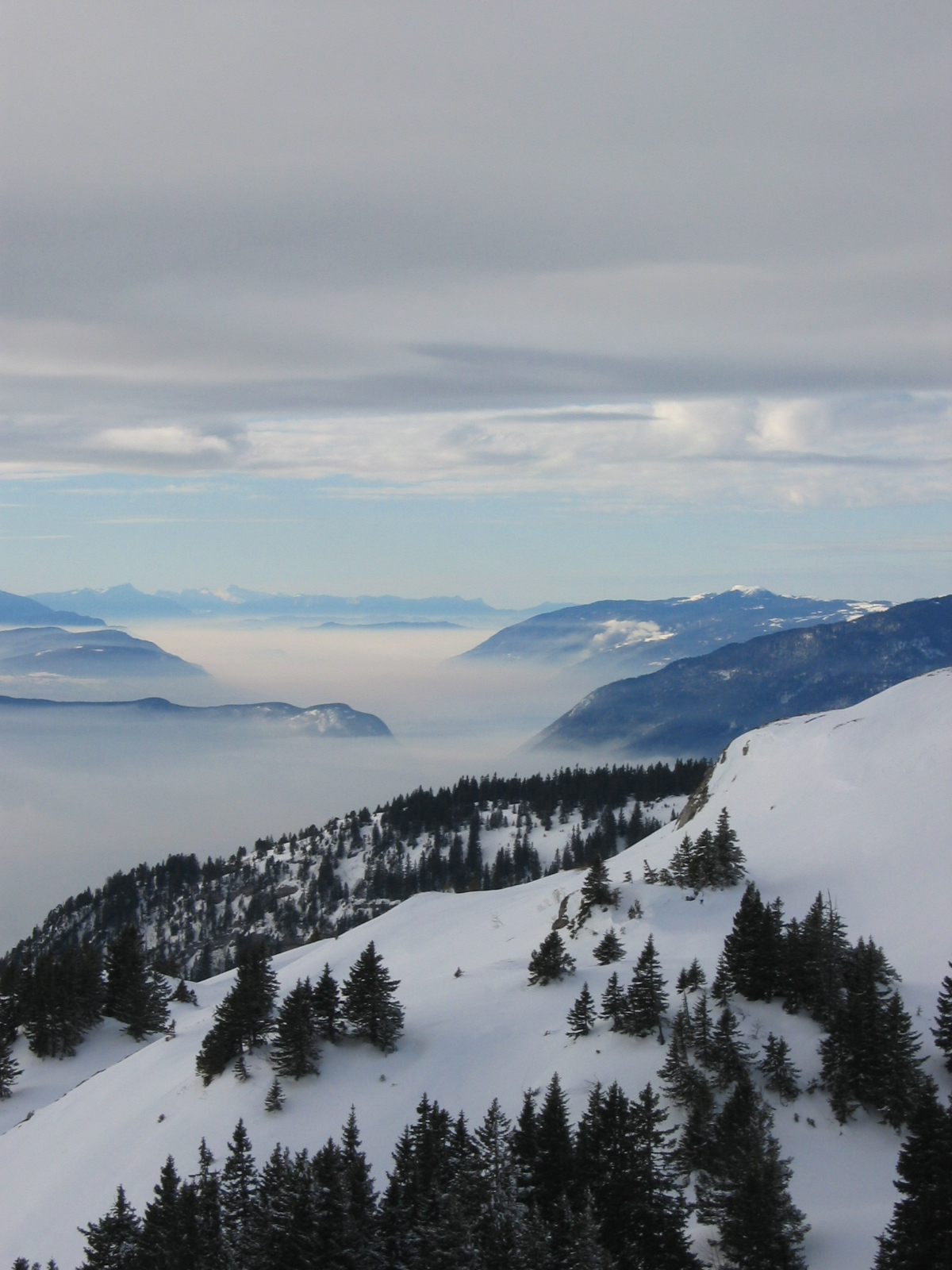 Vue depuis le sommet de la station de Lélex